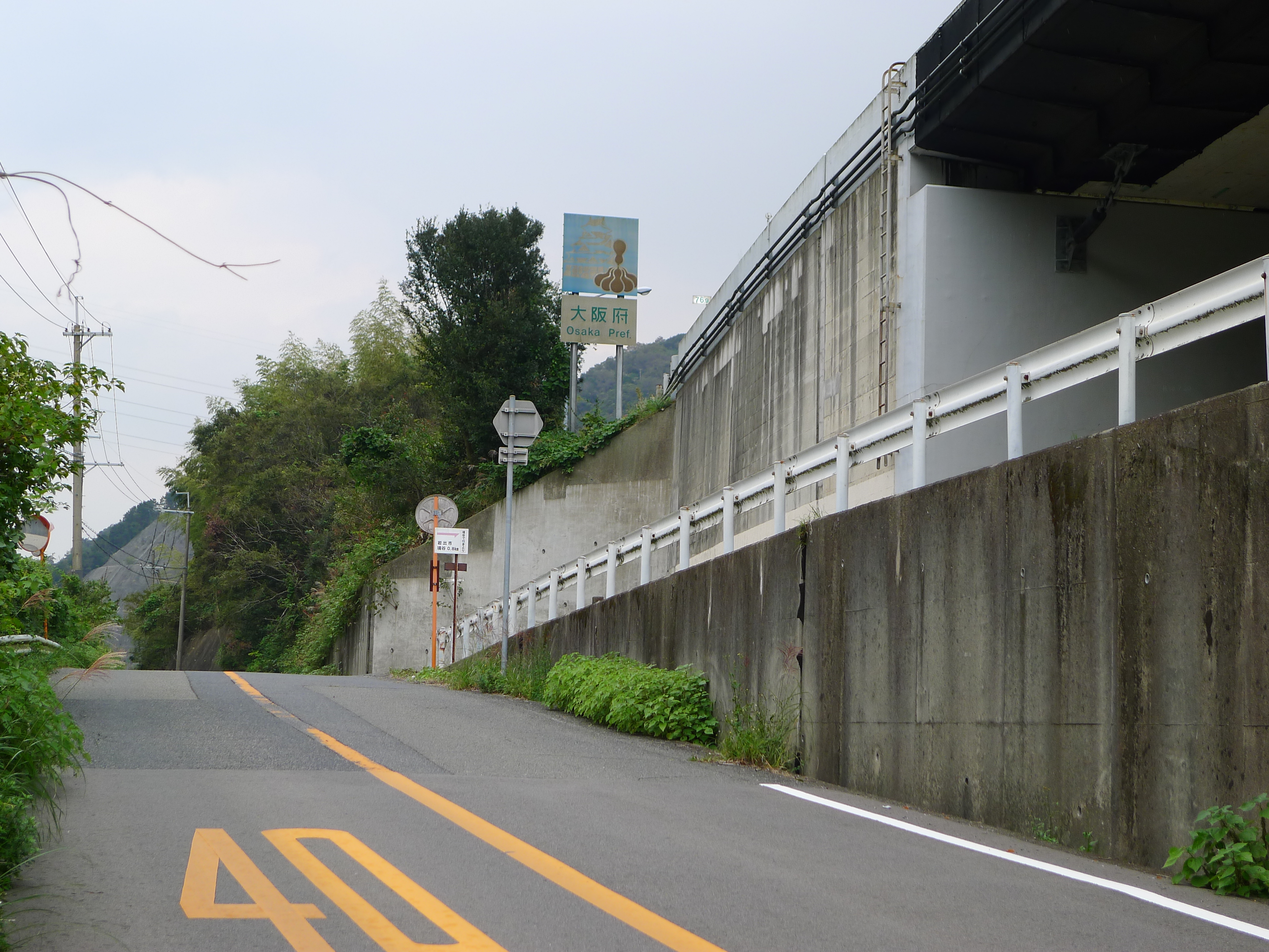 和泉国（大阪府）と紀伊国（和歌山県）の国境となる雄ノ山峠。和歌山市側から阪南市側を望む。和歌山県道・大阪府道64号和歌山貝塚線と阪和自動車道。阪和自動車道に府県境で大阪に入ることを告げる看板が建つ。